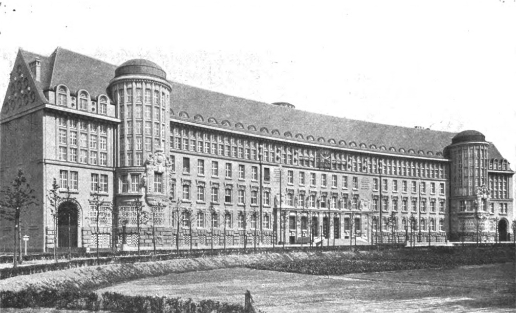 Was will und was soll die Deutsche Bücherei? Gesellschaft der Freunde der Deutschen Bücherei. Leipzig: Poeschel & Trepte, [1921?] Image [2] on page 2: Stirnseite der Deutschen Bücherei